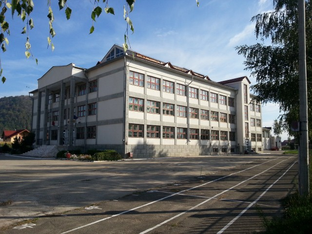 Școala generala Liviu Rebreanu